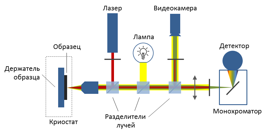 Схема установки микро-фотолюминесцентной спектроскопии